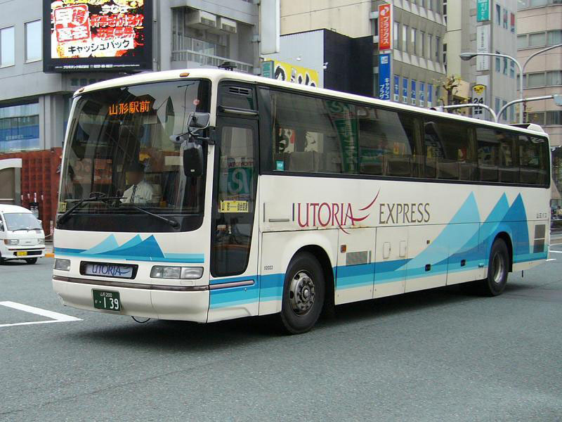 登録番号 山形200か139 山交バス所属 高速用車両 （各系統で共通運用） 2005年11月6日 山形駅前にて撮影 撮影者 Tokatsu kokubu